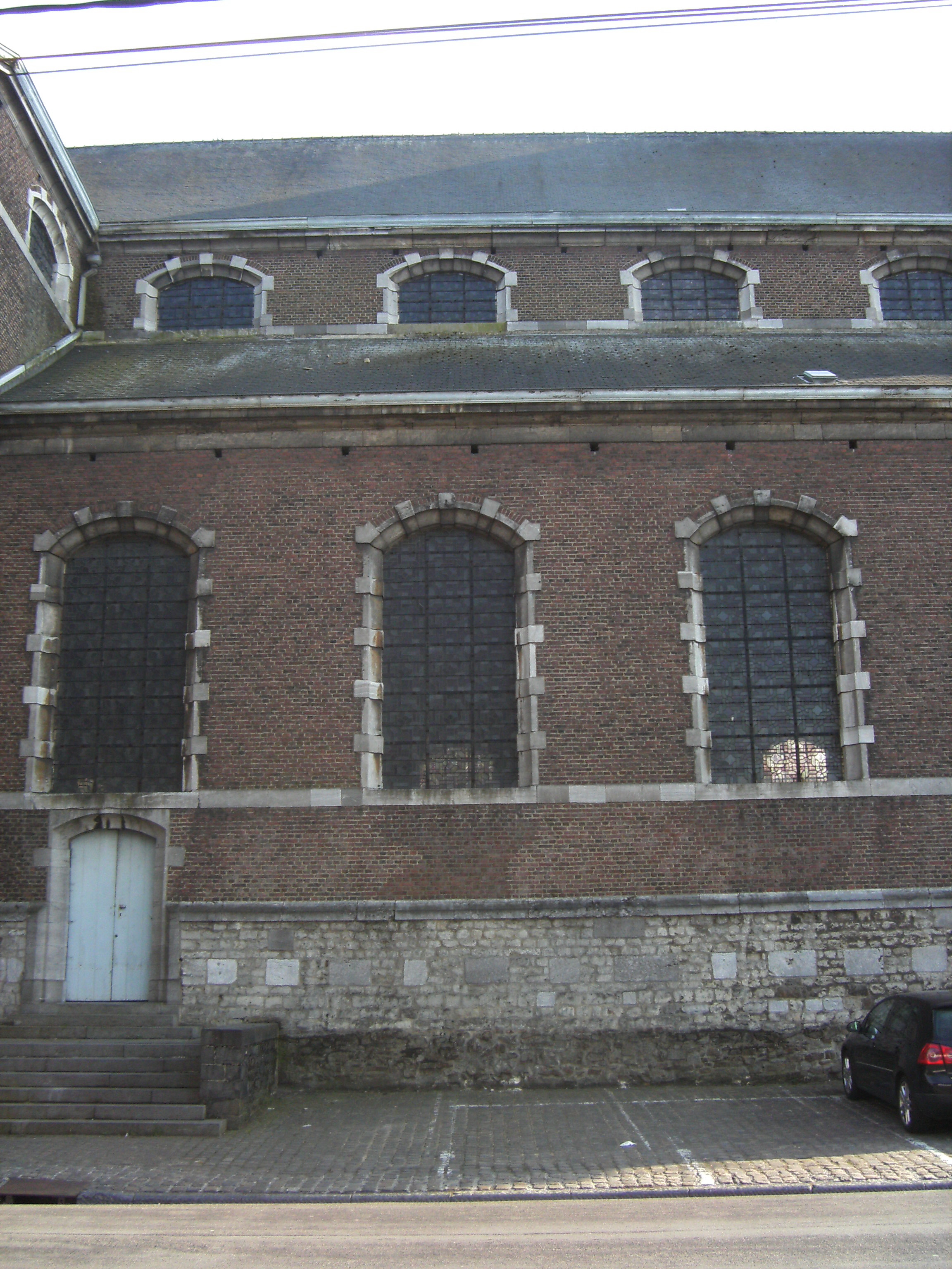 Jumet (Charleroi - Belgique) - Église Saint-Sulpice (1750-1753) - trois travées nord